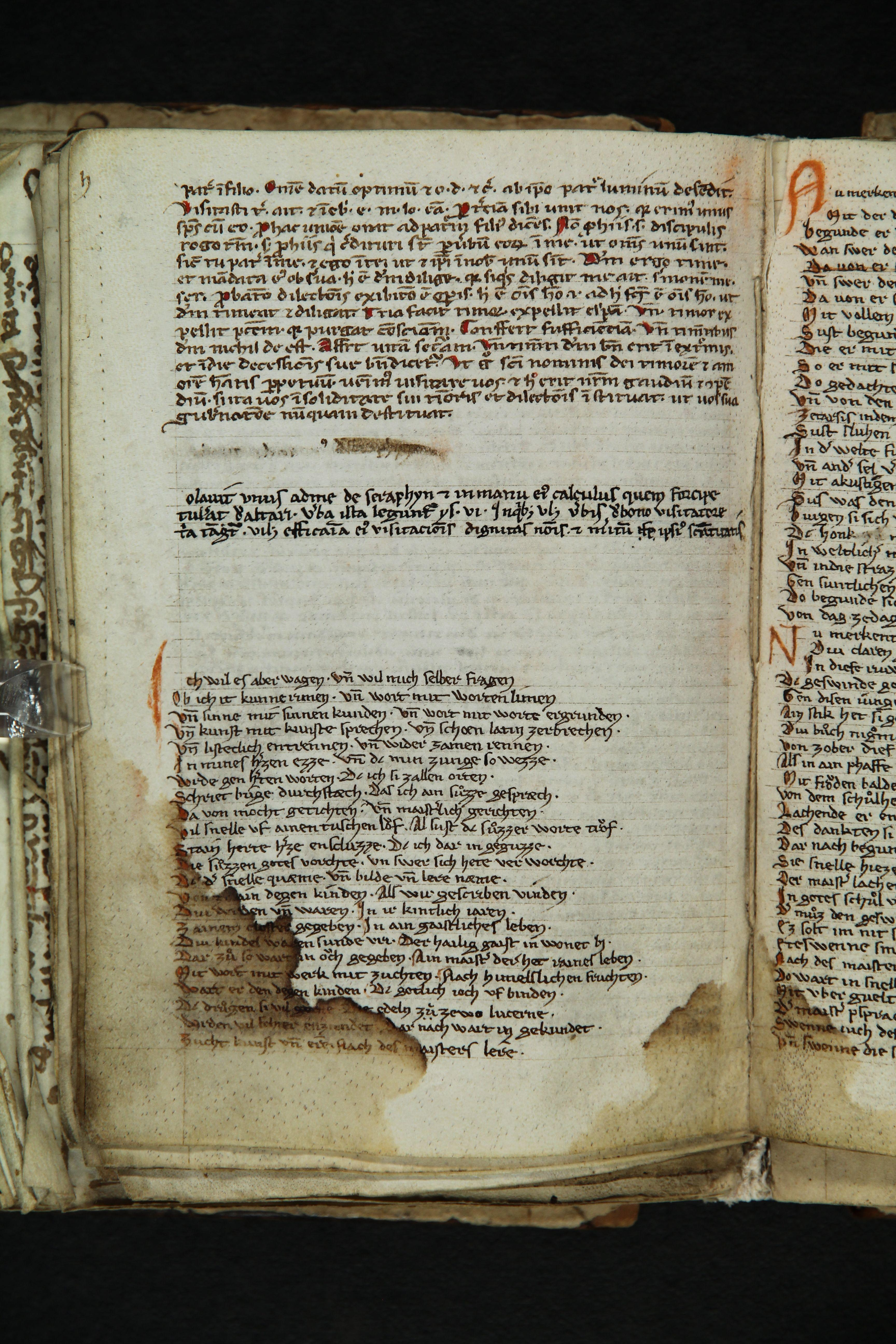 Faksimile der ersten Seite der "Vorauer Novelle", Vorau, Stiftsbibliothek, Cod. 412, fol. 81v.